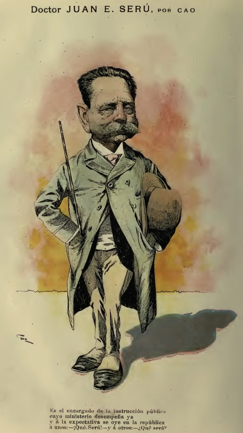 Juan Seru, Ministro de Instrucción Pública de Argentina